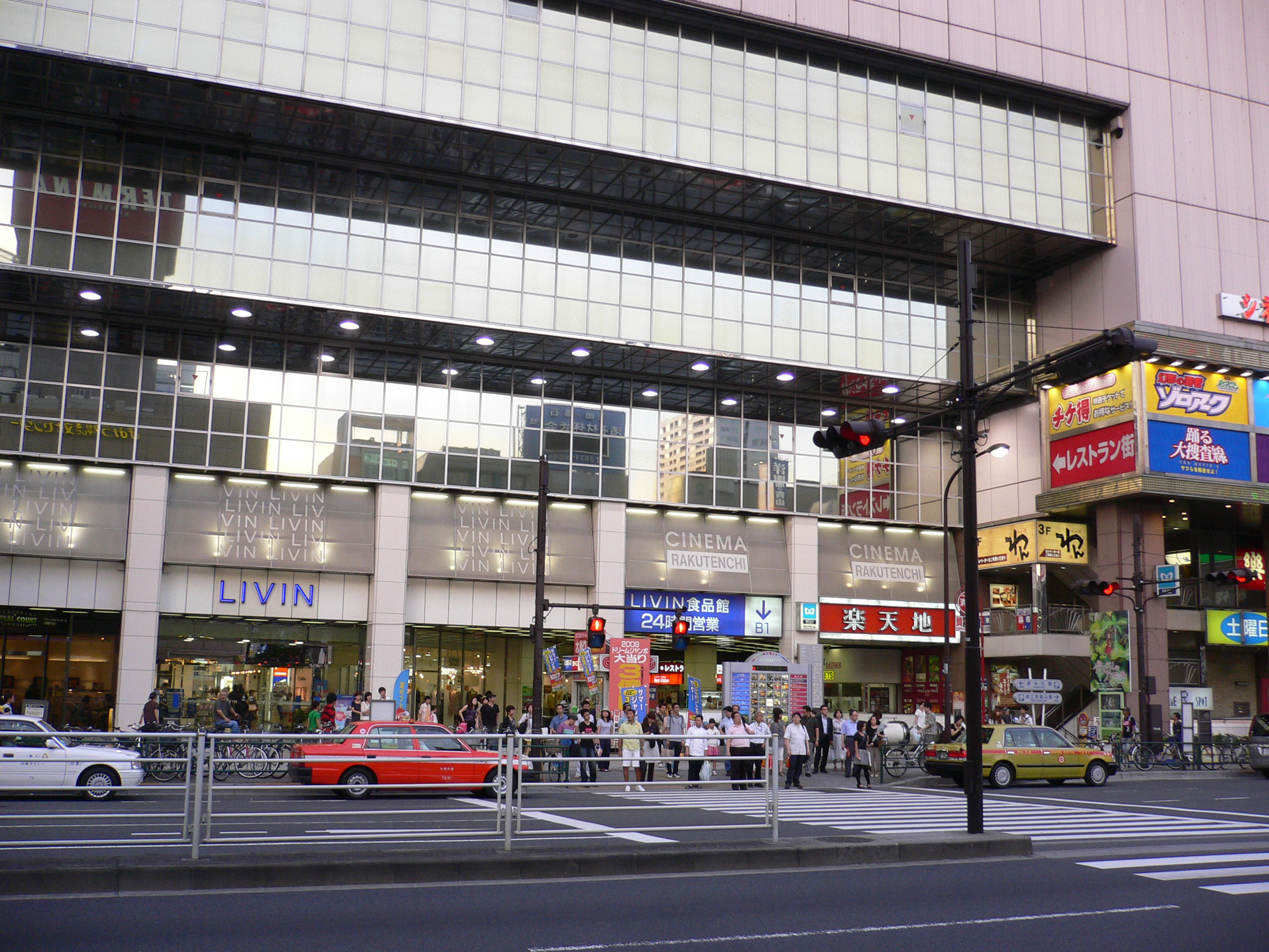 LIVIN